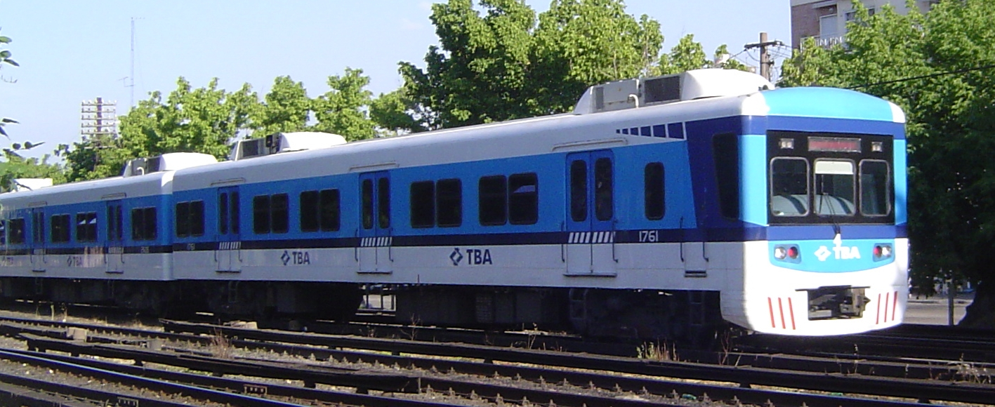 Unidad eléctrica del ferrocarril Sarmiento a su paso por la ciudad de Haedo